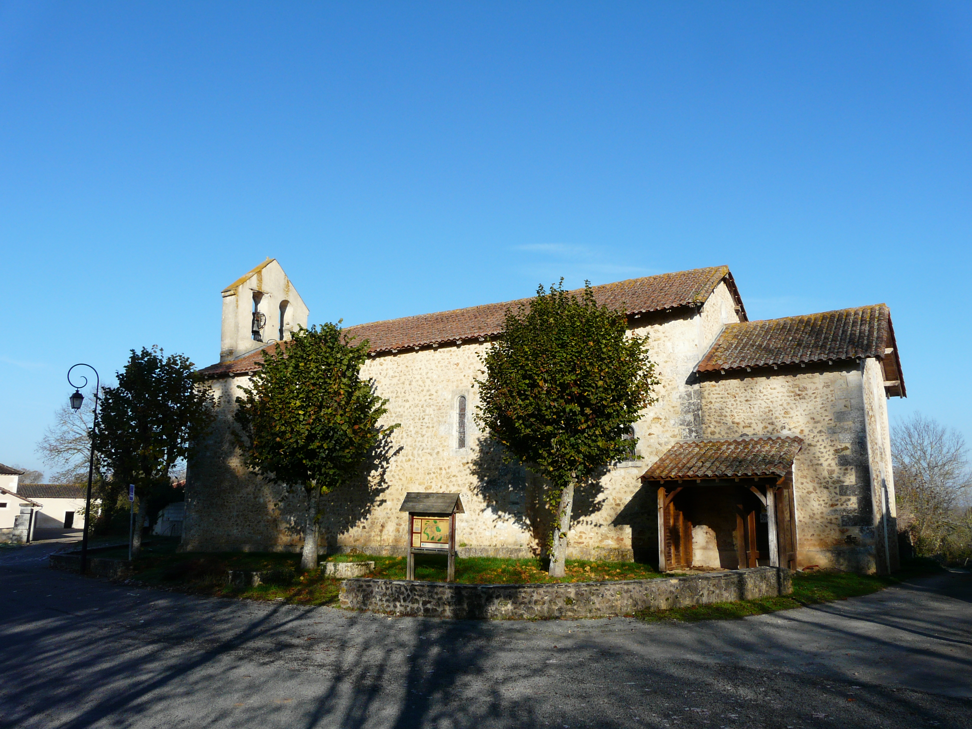 L'église Saint-Pardoux de Creyssensac, Creyssensac-et-Pissot, Dordogne, France.